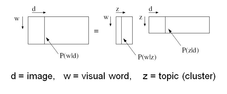 clustering BoW vectors